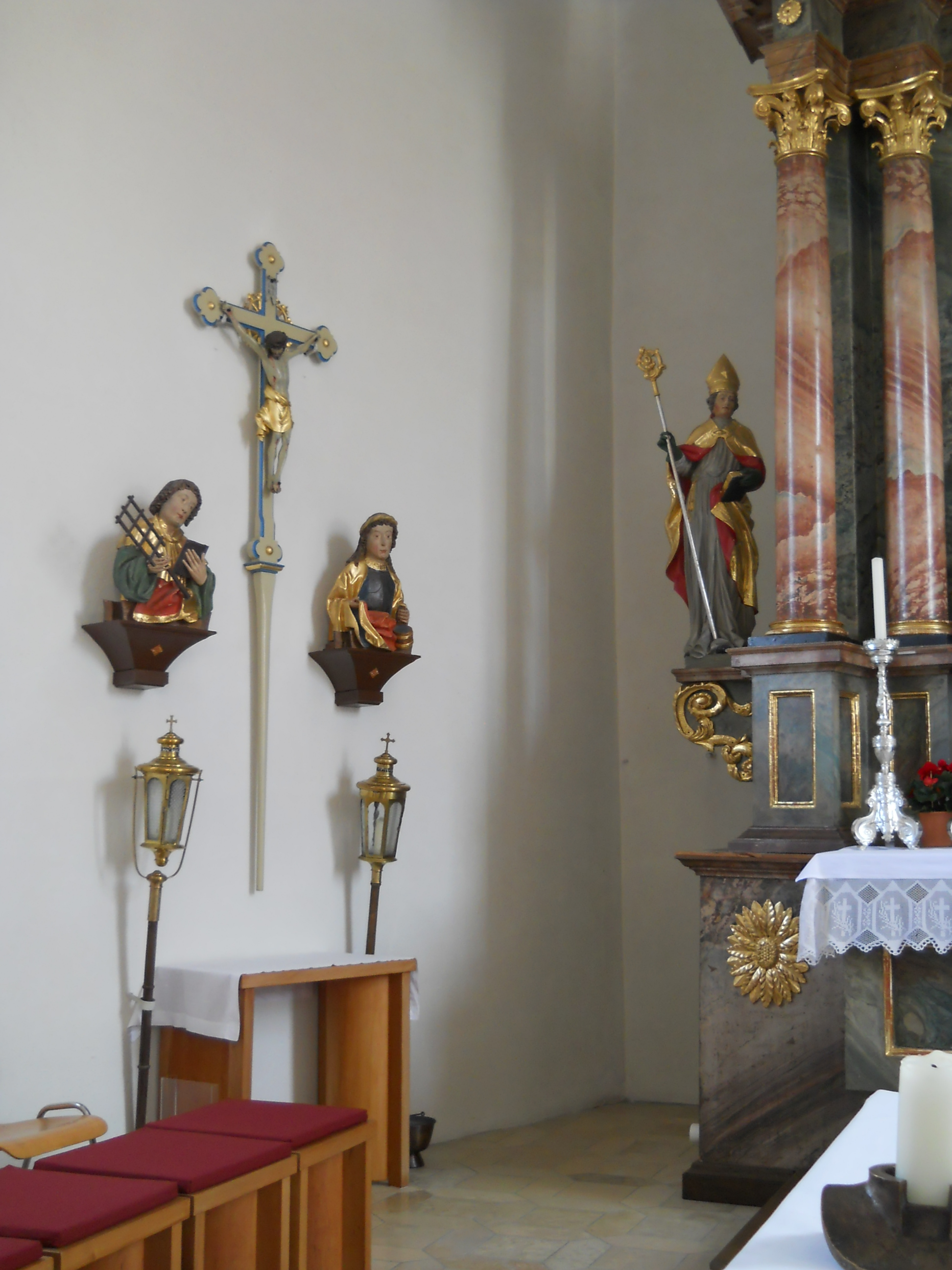 Rauenzell, Ortsteil von Herrieden im Landkreis Ansbach (Bayern), Kath. Pfarrkirche Mariä Heimsuchung, nördliche Chorwand